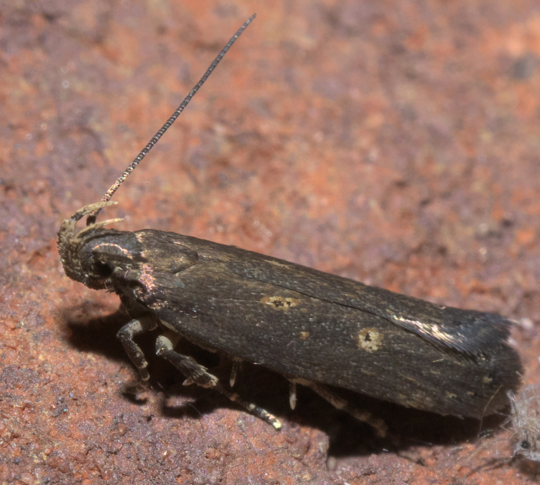 Chionodes discoocellella, eyeringed chionodes moth, Size: 7.3 mm, ID Confidence: 90